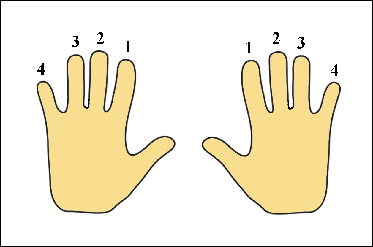 "Прсти леве и десне руке", аутор Радивој Лазић, лични рад, 5. 12. 2012. године.